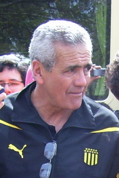 Gregorio Pérez, entrenador del Club Atlético Peñarol en los Festejos por los 120 años del Club en la Estación Peñarol, Montevideo, Uruguay.